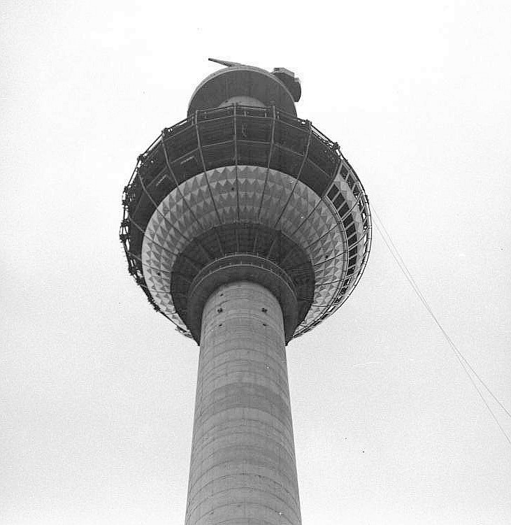 Berlin, Bau Fernsehturm Berlin, Fernsehturm [Berlin.- Bau des Fernsehturms]